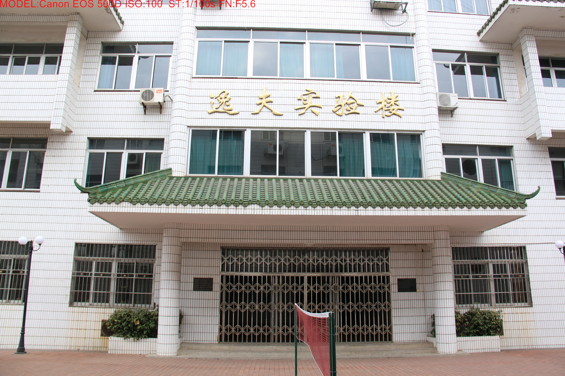 中文（中国大陆）: 这是位于著名山水名城桂林市老人山脚下的“桂林宝贤中学”内的“逸夫实验楼”。